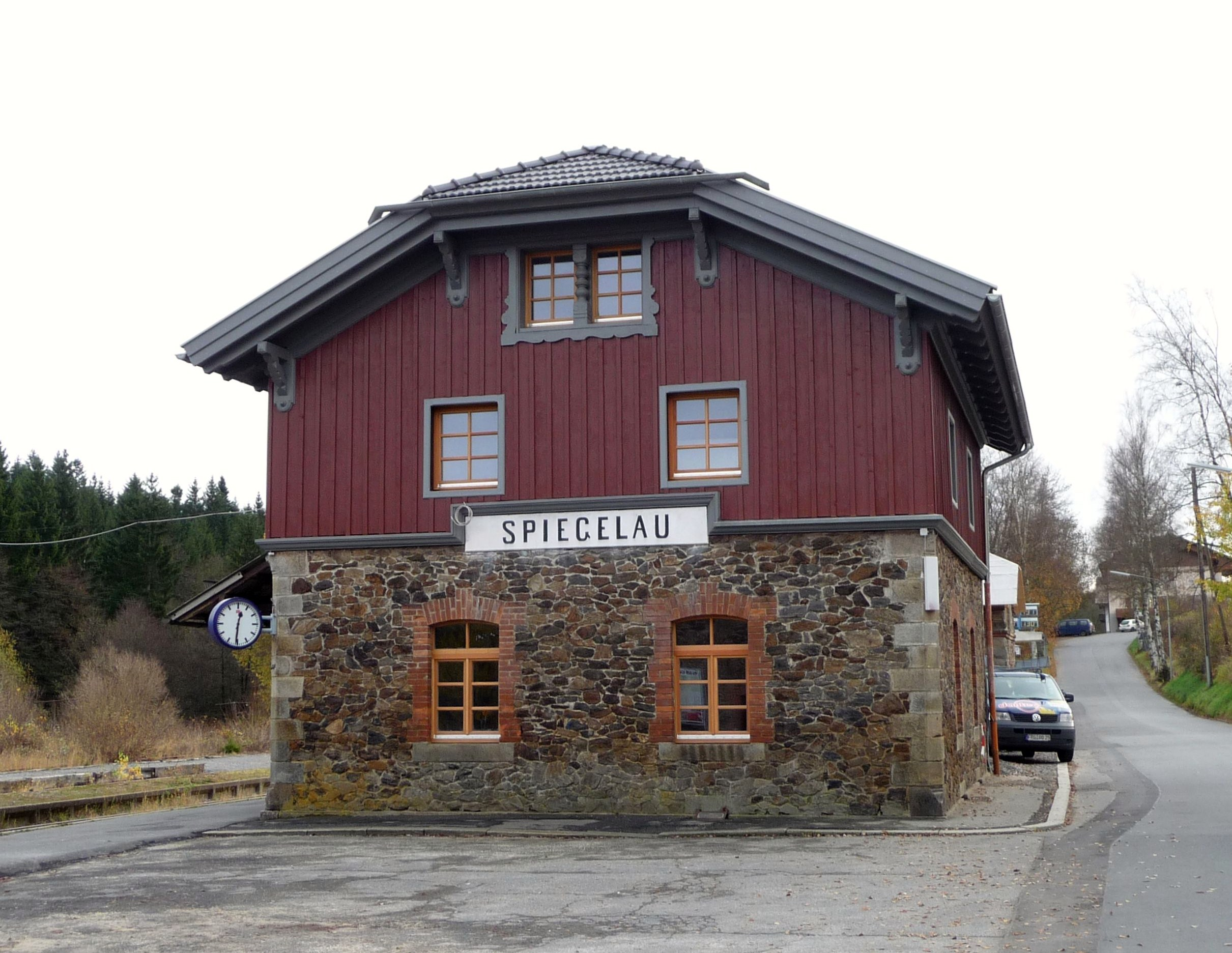 Der Waldbahnhof Spiegelau